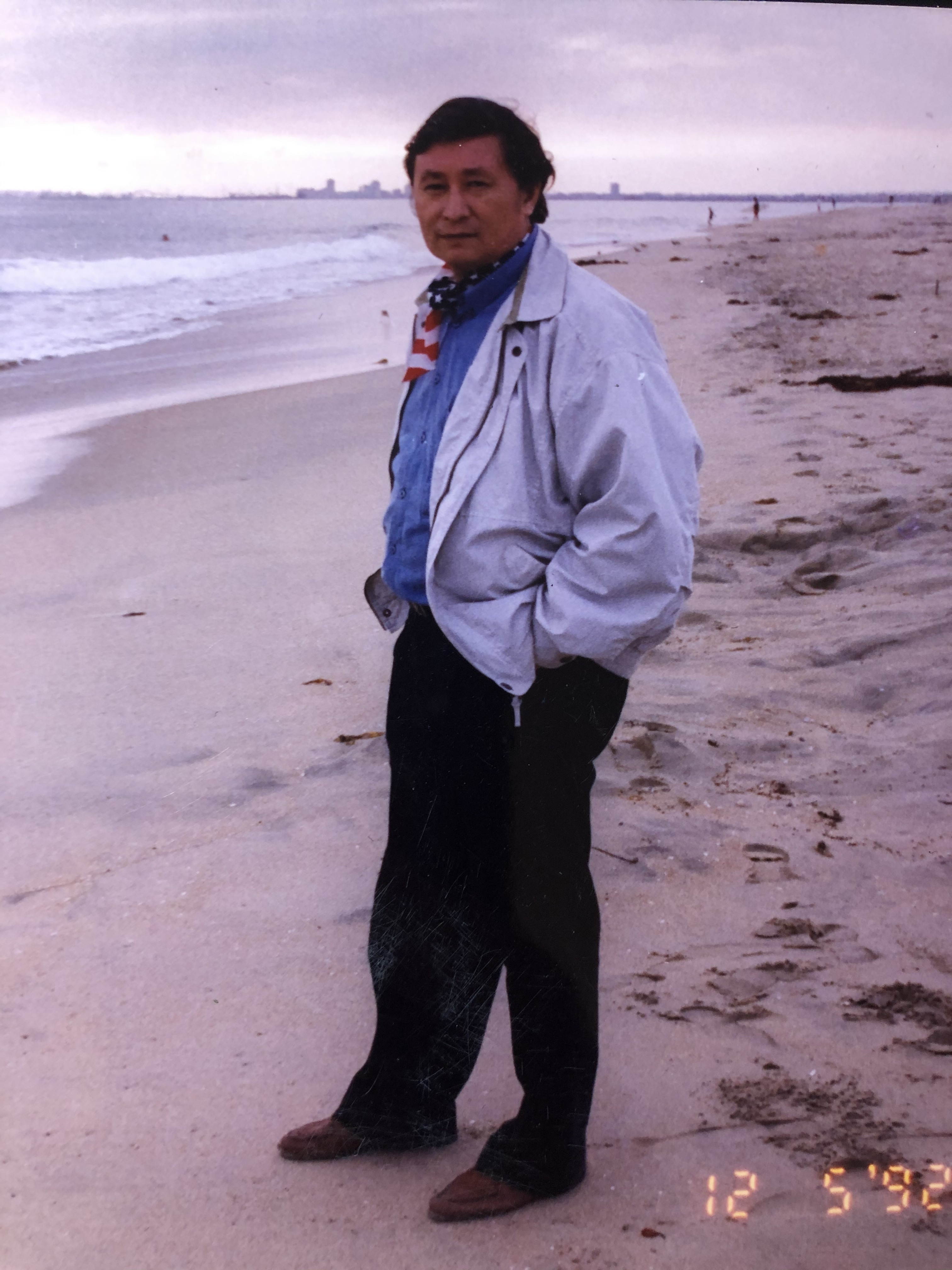 1992, Лос Анжелес